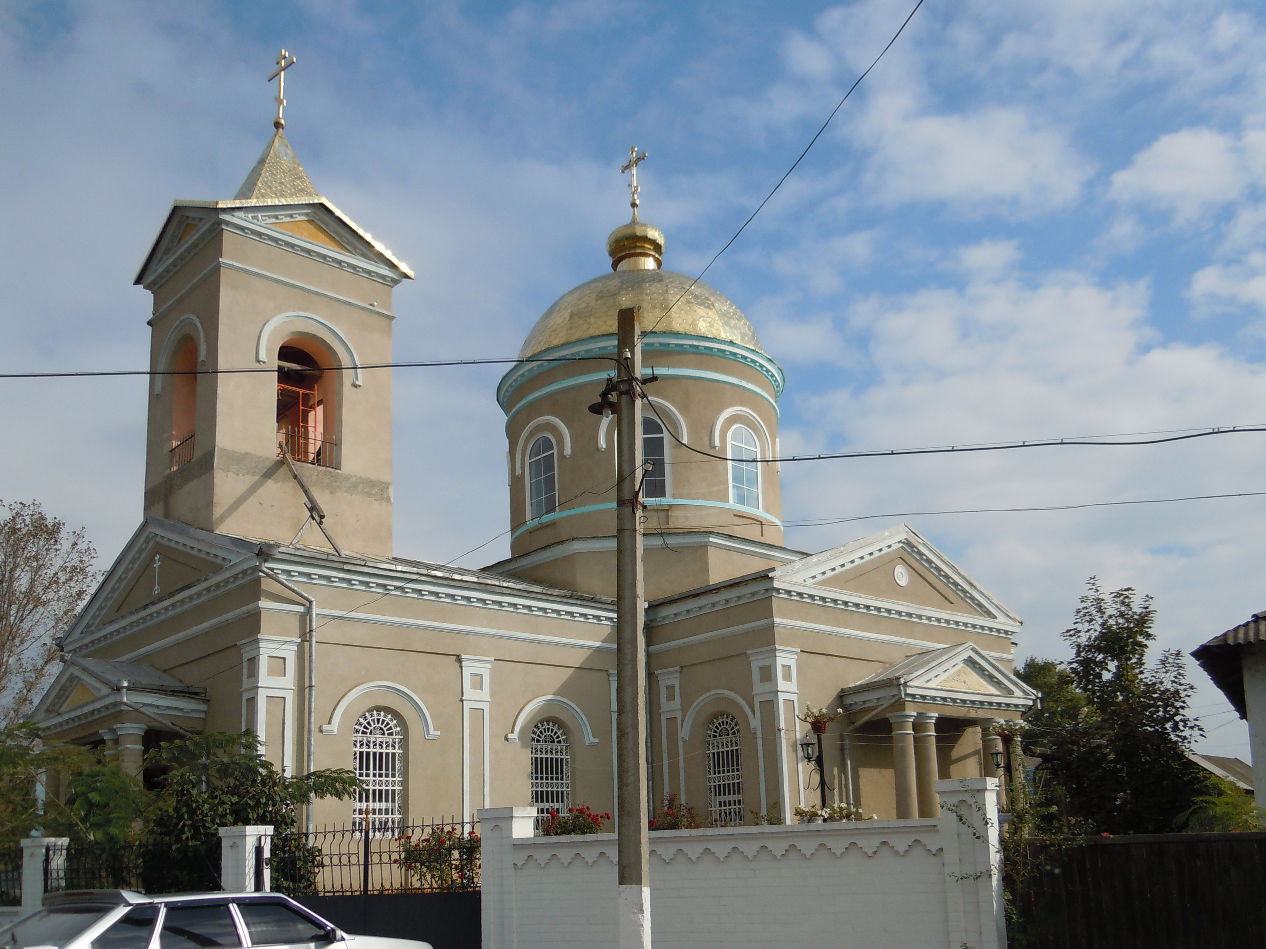 Собор св. Ферапонта, Новосільське, Ренійський район